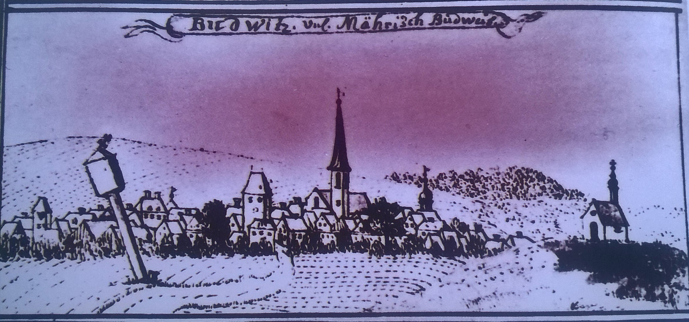 Nejstarší známý pohled na Moravské Budějovice (kolem roku 1750)